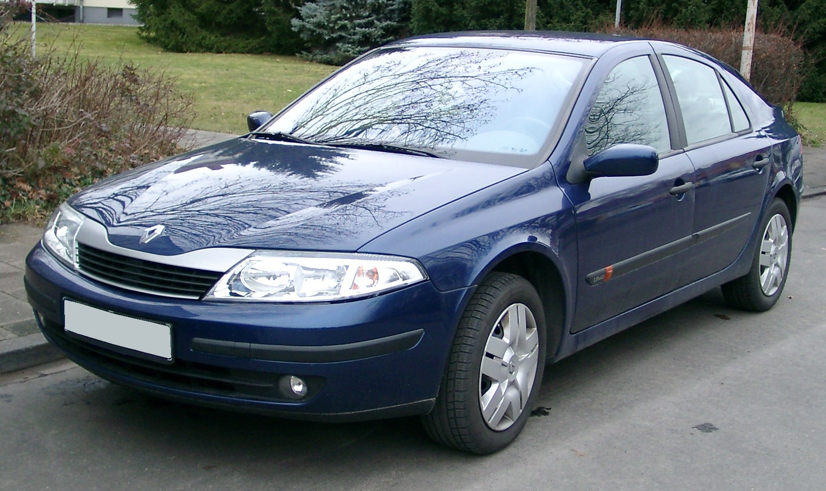 Renault Laguna, 2. Generation